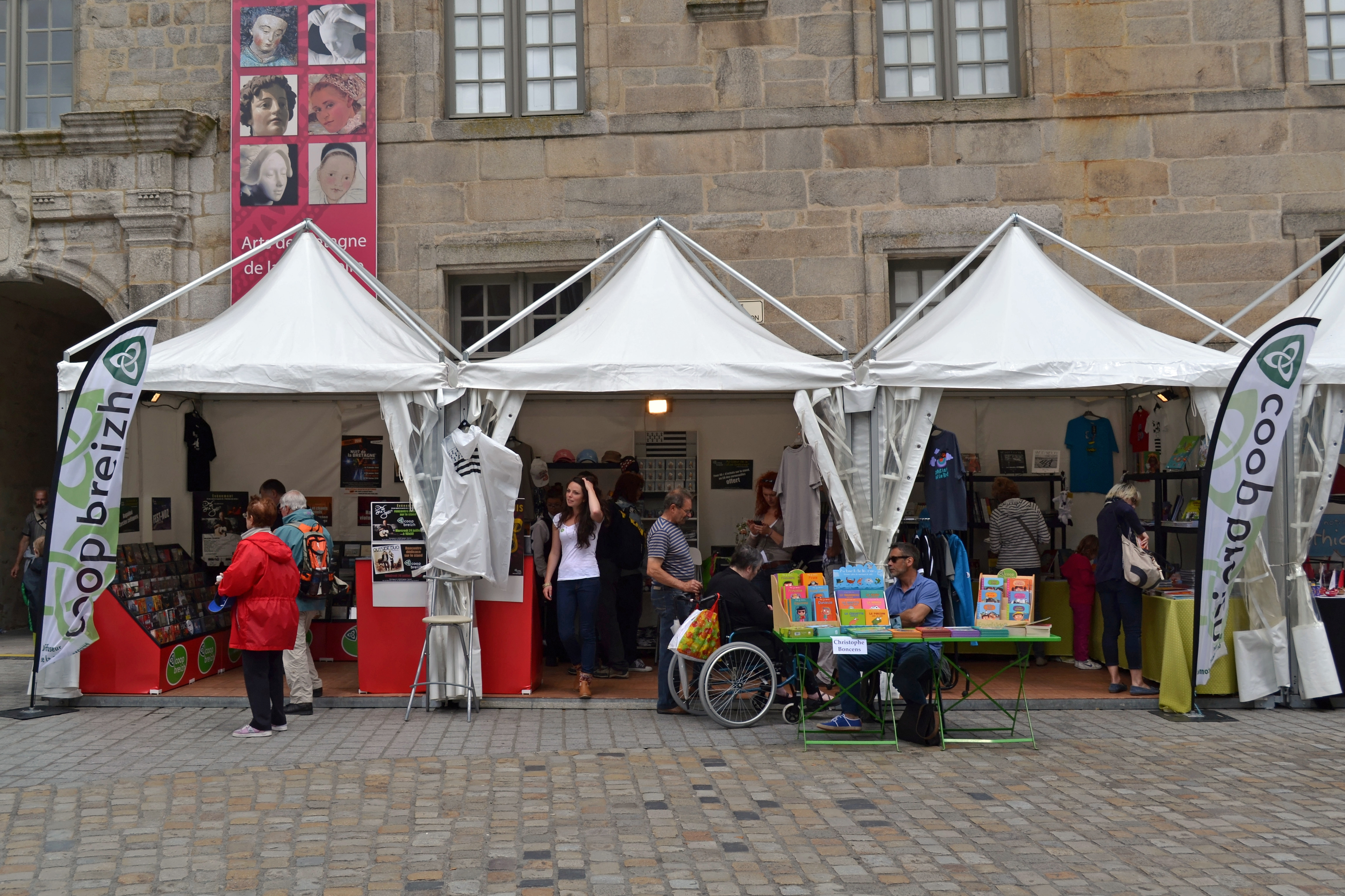 Stand Coop Breizh lors du Festival de Cornouaille 2013.